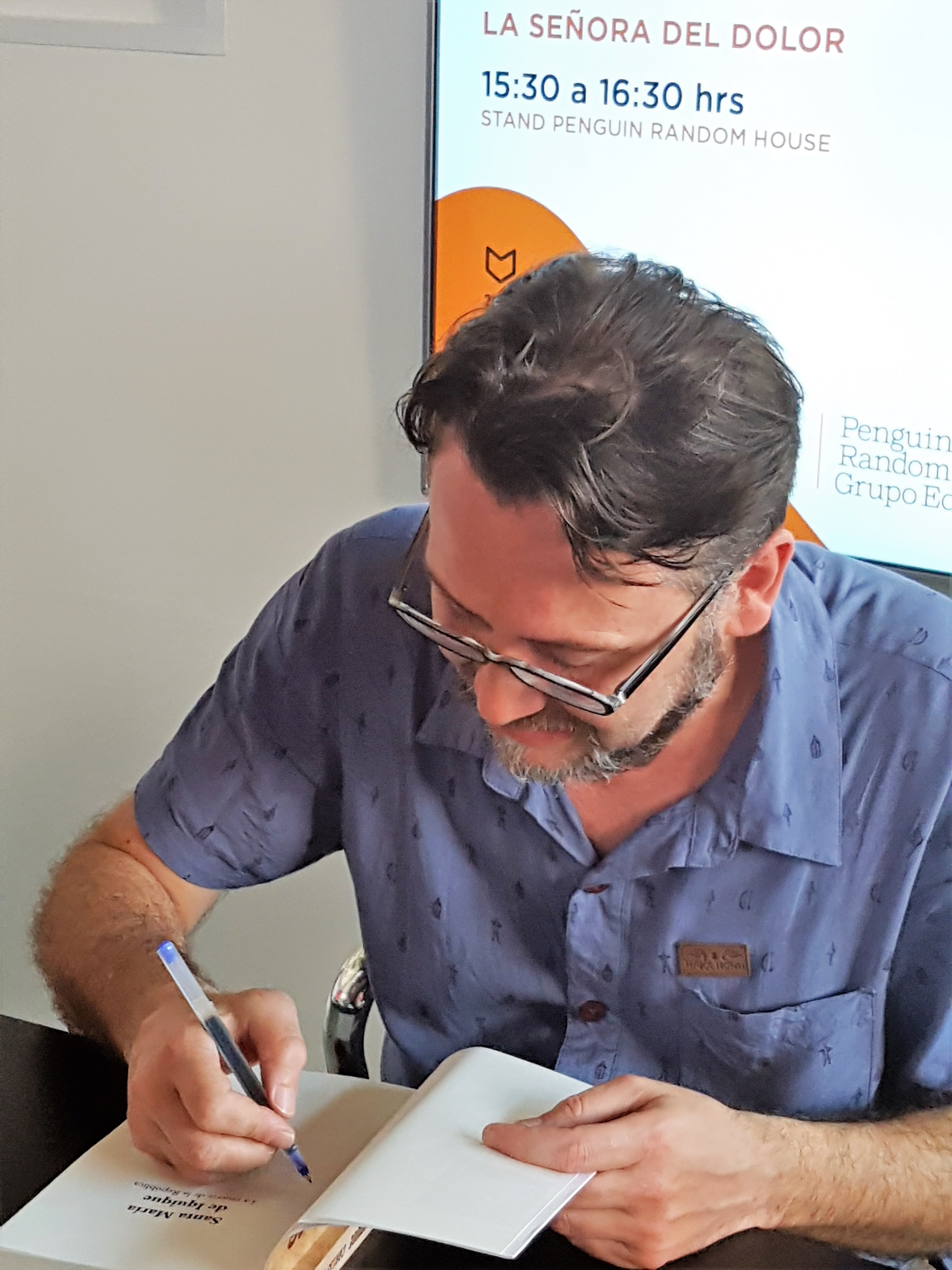 El escritor chileno Carlos Tromben en la Feria Internacional del Libro de Santiago 2017